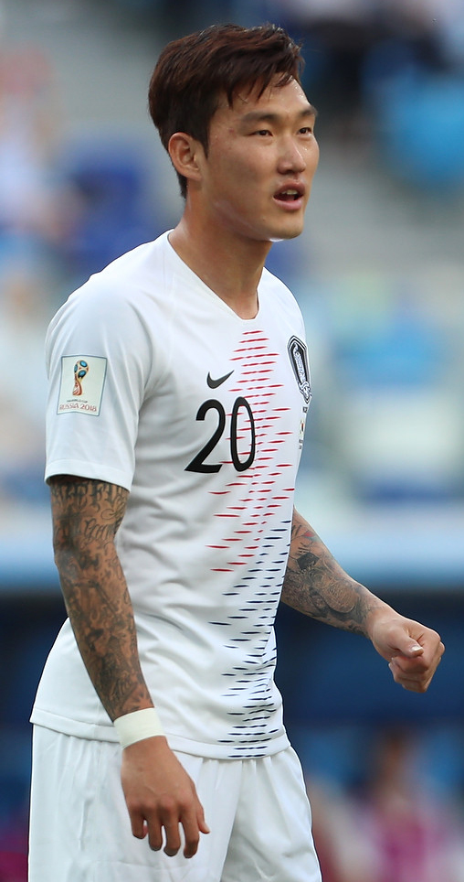 Швеция победила Южную Корею в матче ЧМ-2018